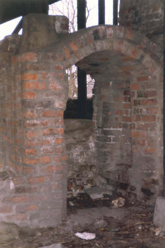 Älvsborgs slottsruin i Göteborg